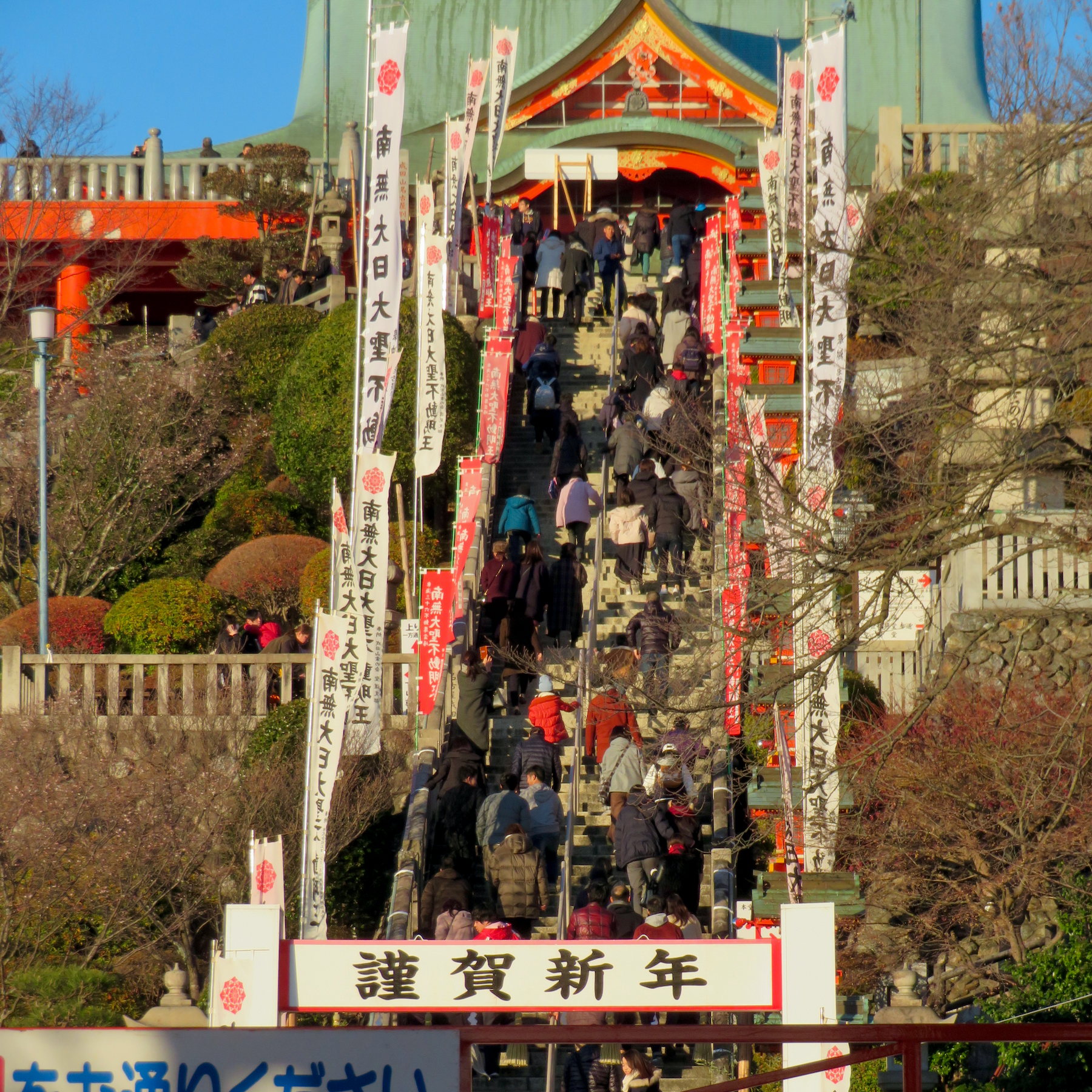 初詣客で賑わう正月三が日の犬山成田山（成田山名古屋別院大聖寺）の様子。